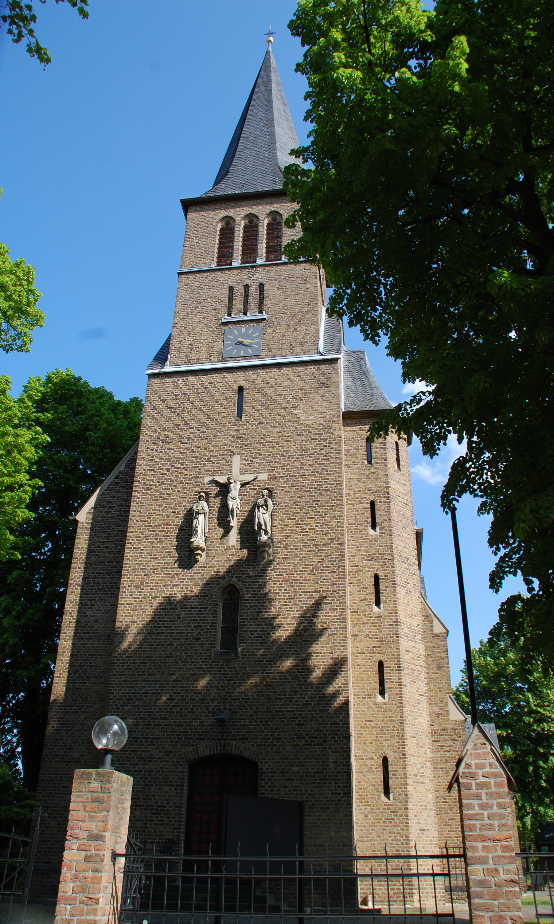 Niederberg, Germany: St. Johann Baptist